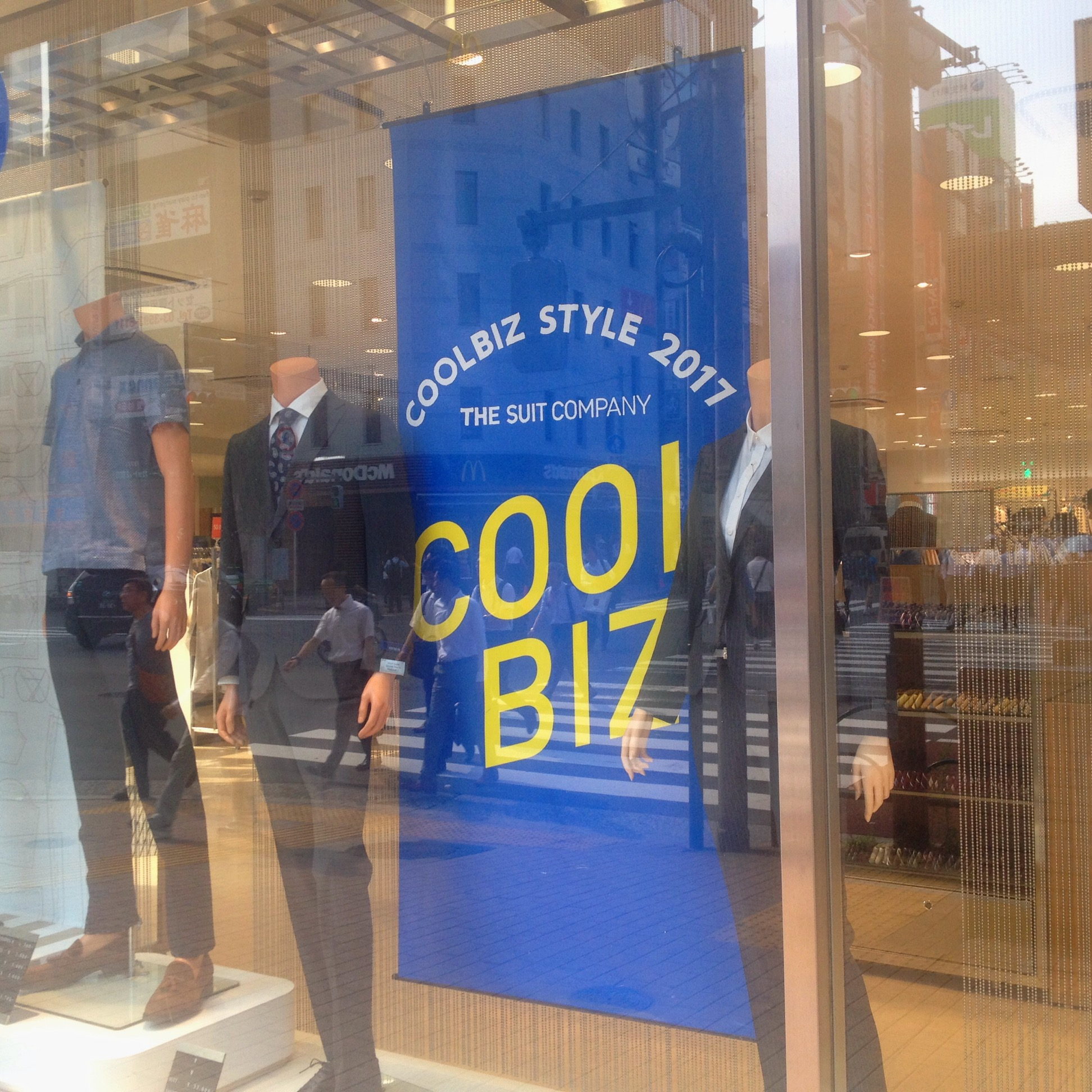 クールビズ (cool biz)